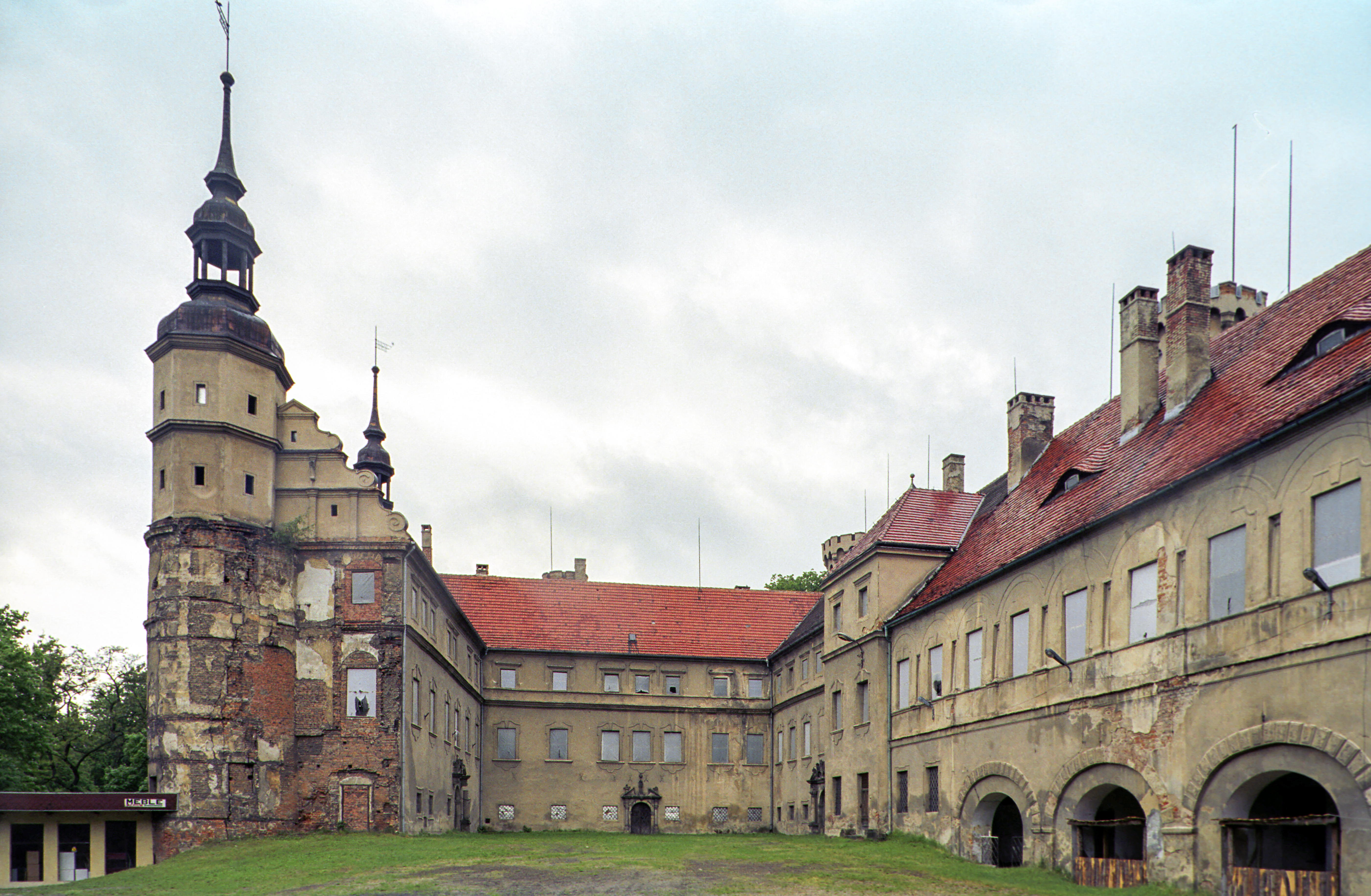 Głogówek